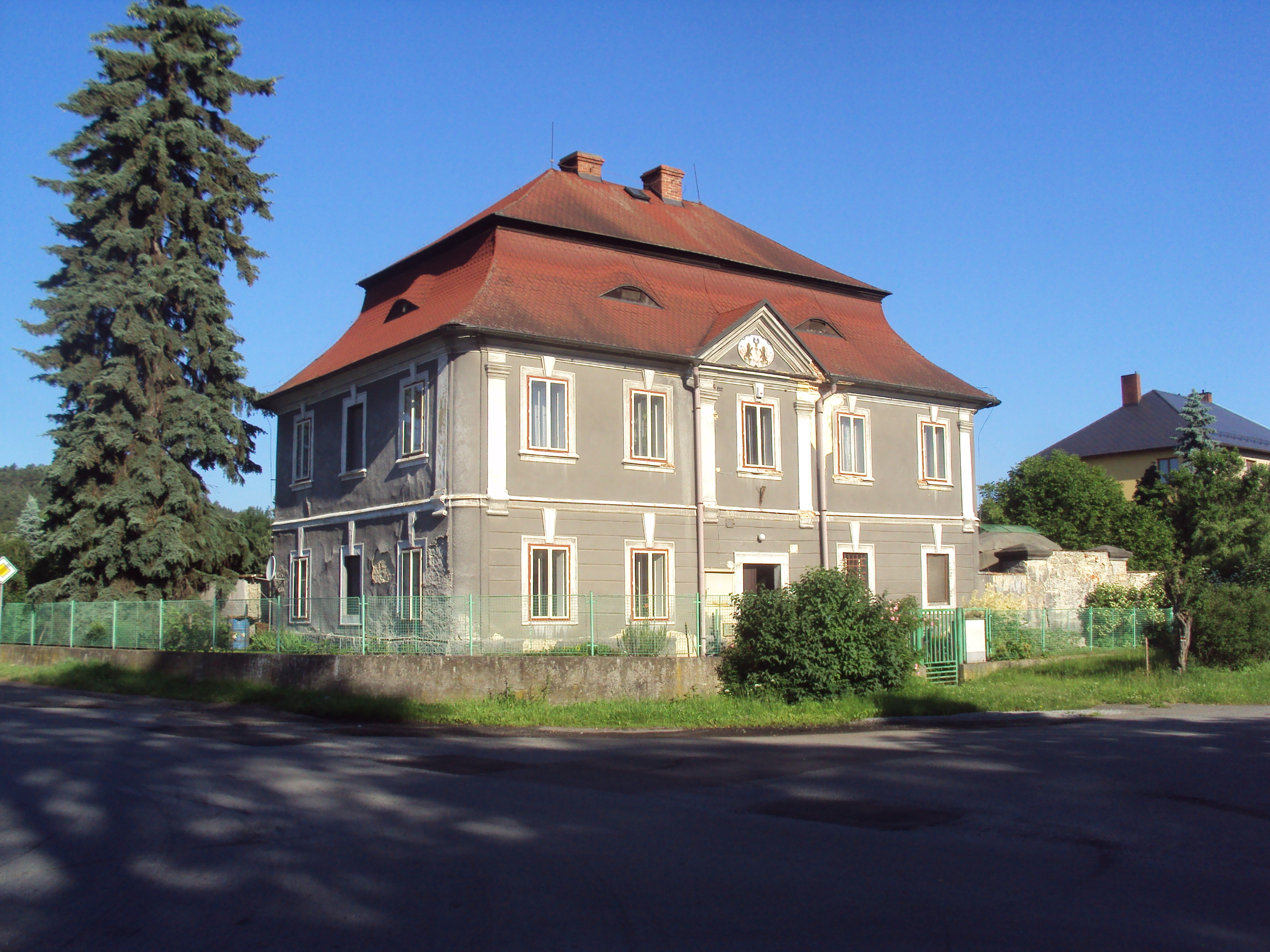 Fara je památkově chráněná, adresa Jestřebí 90